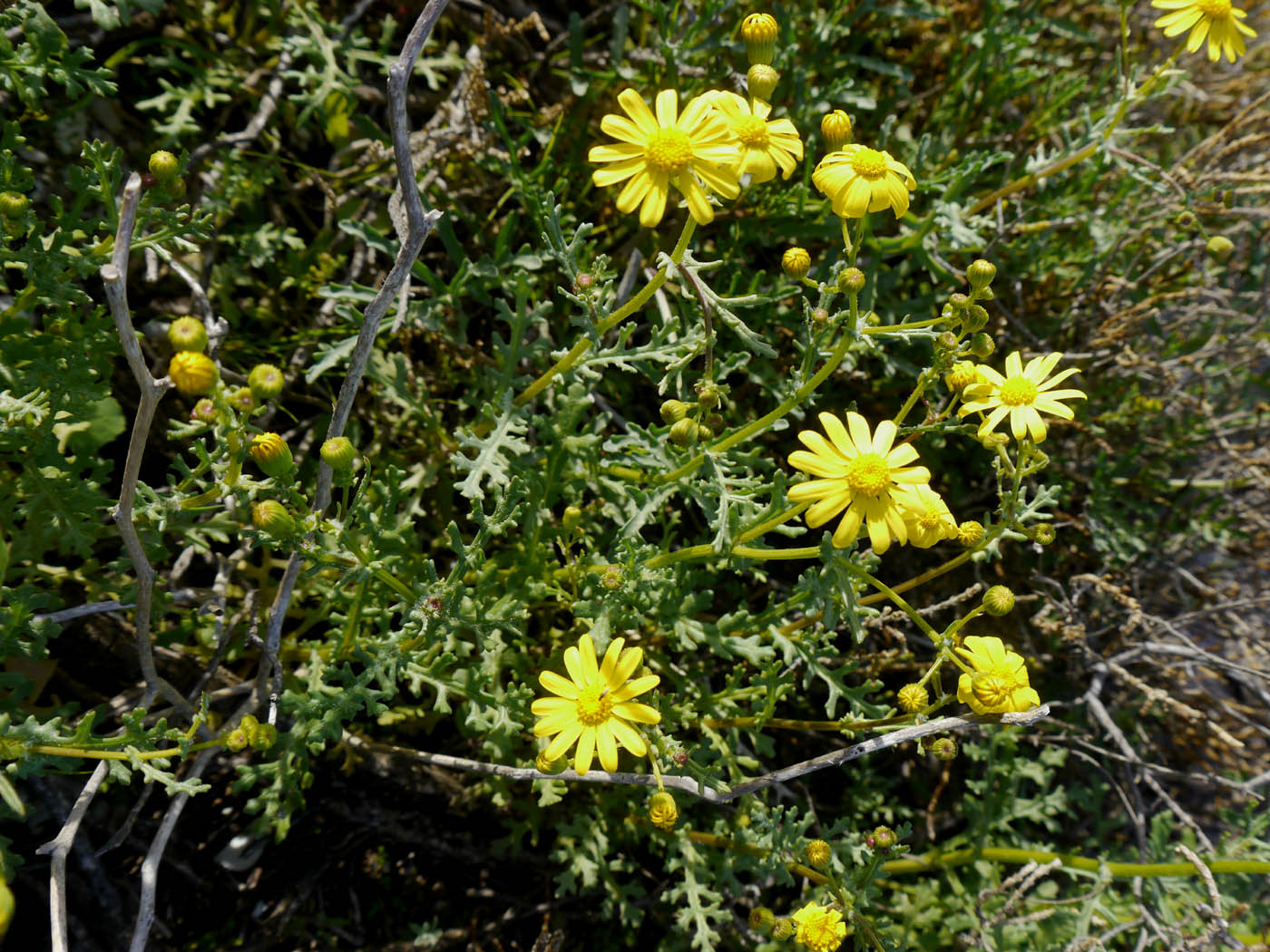 Senecio glaucus en Veneziola (La Manga del Mar Menor, España) en el límite sur del Parque Natural de las Salinas de San Pedro del Pinatar.